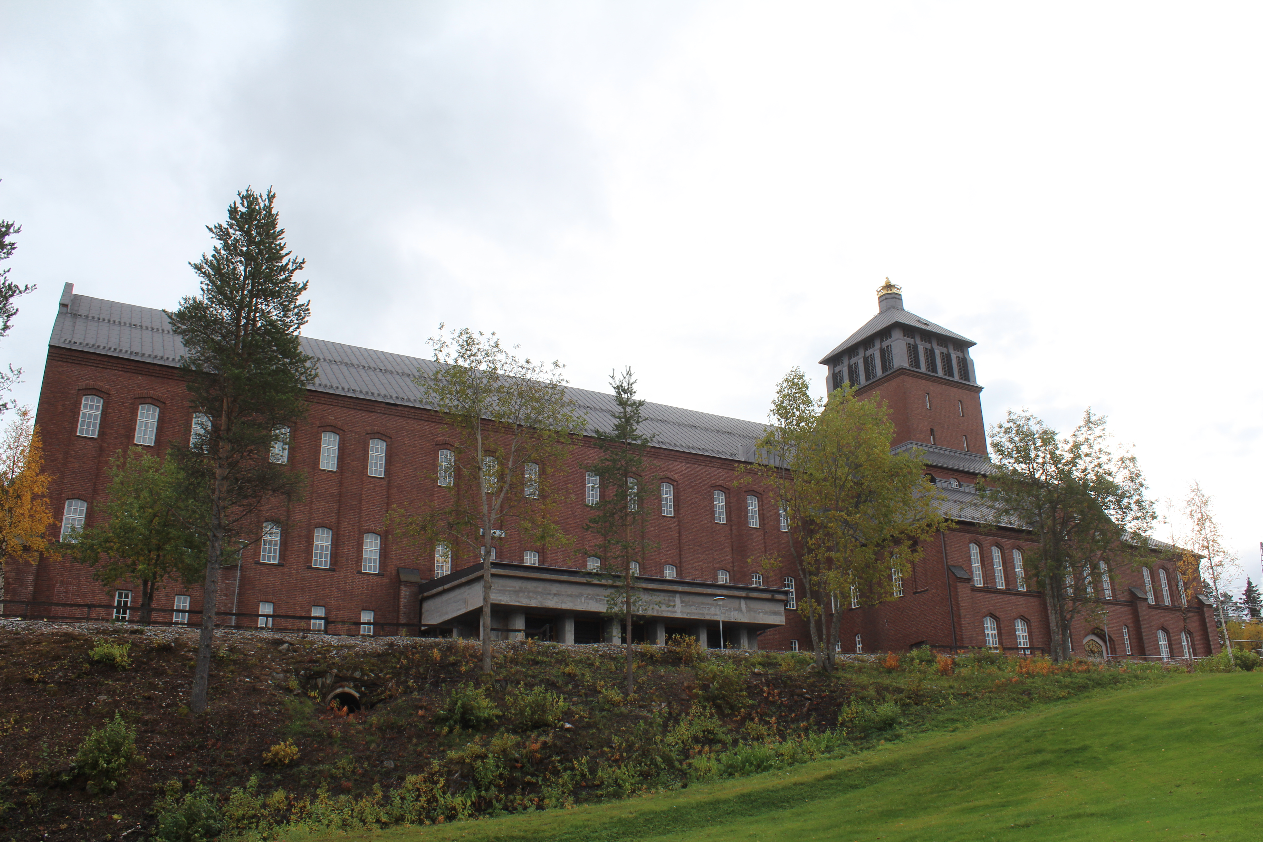 Porjus gamla kraftverk (Porjus 1:164)